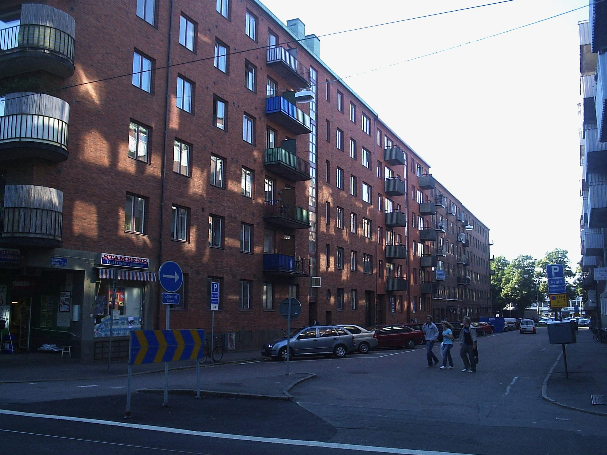 Baldersgatan i Göteborg, den 12 sept 2006